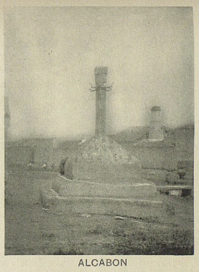 Rollo de Alcabón